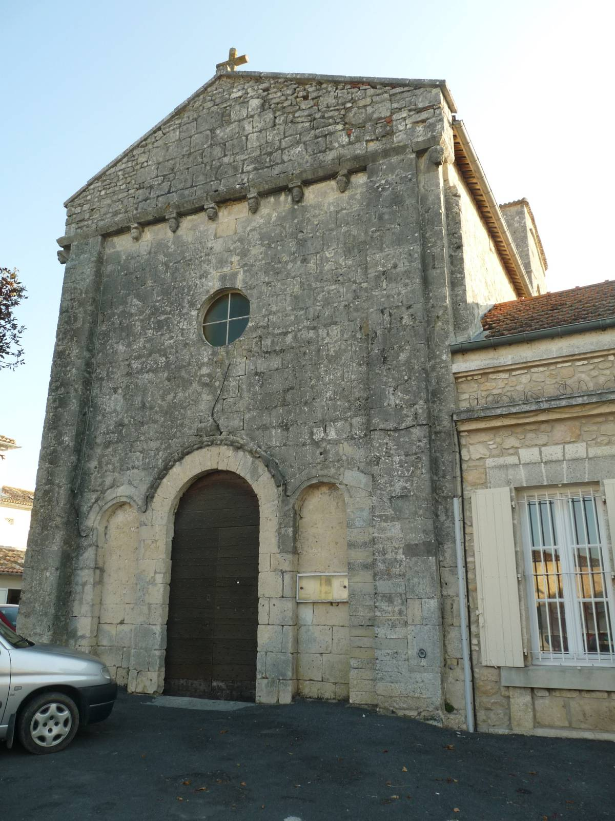 église de Vindelle (16), France